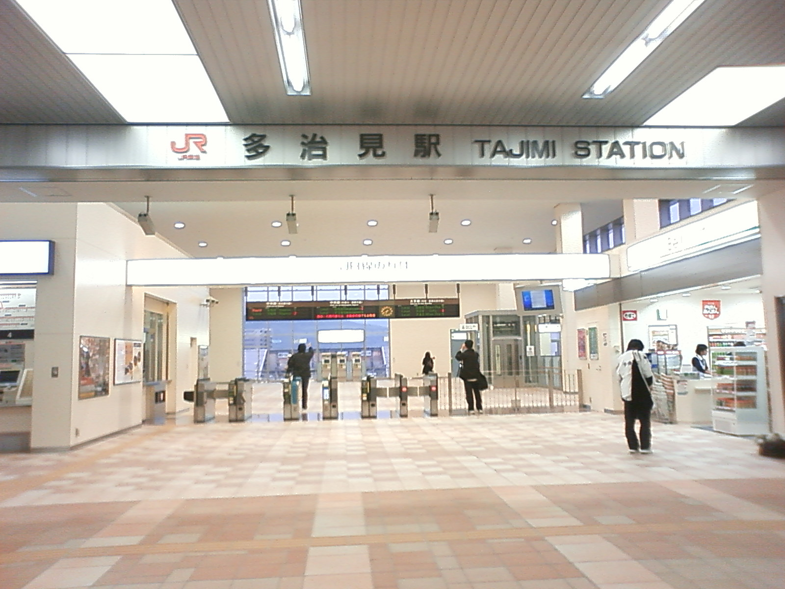 JR多治見駅新駅舎改札口